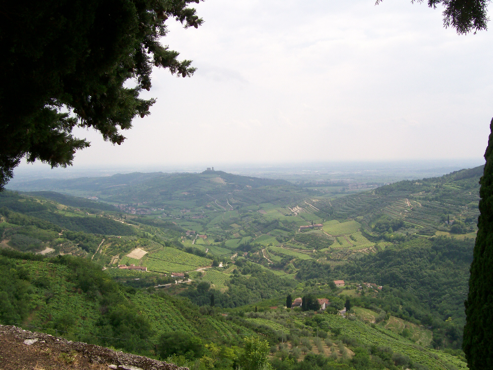 Veduta della Val Tramigna da Campiano. Al centro, sul monte, il castello d'Illasi. Sulla destra, nella valle, Cazzano di Tramigna, mentre sulla sinistra si vede Illasi.